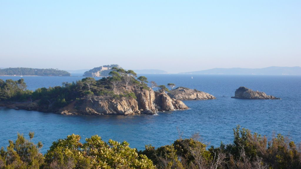 Fort de Brégançon à l'arrière plan, vu du Cap Léoube, Var - France